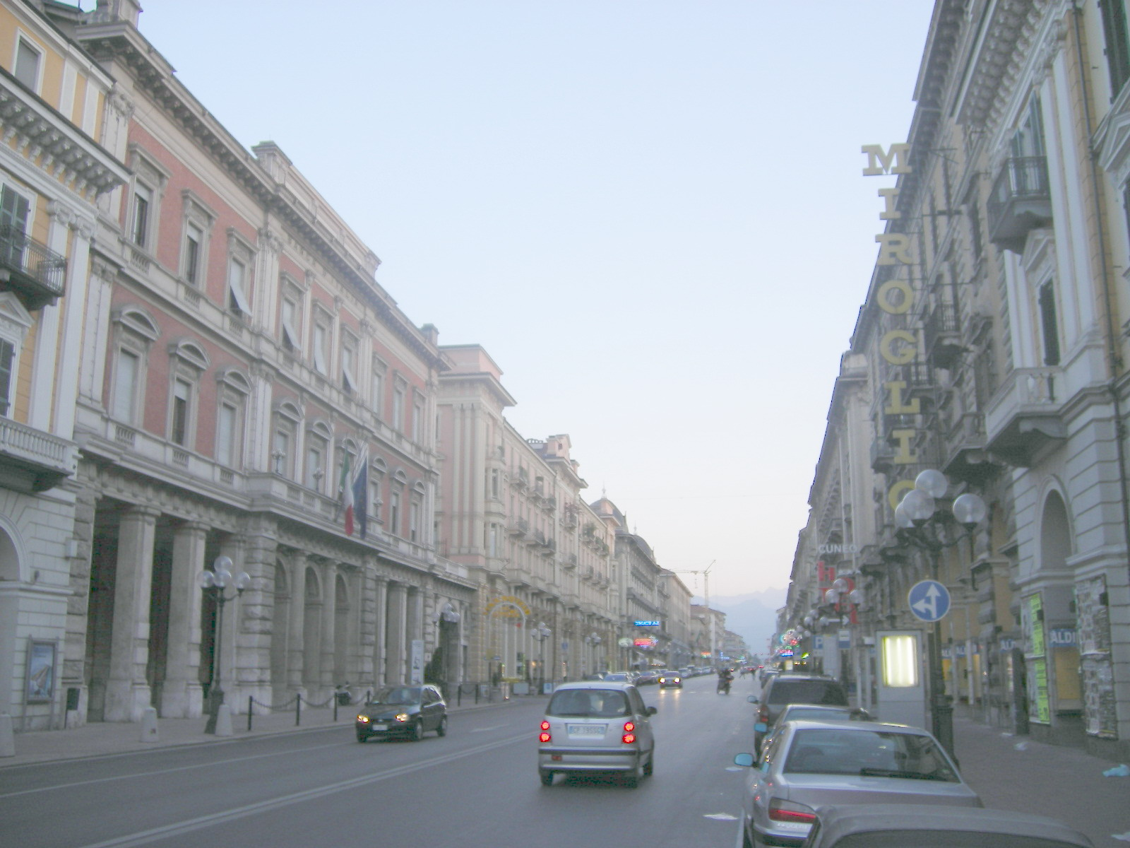 Cuneo- Corso Nizza